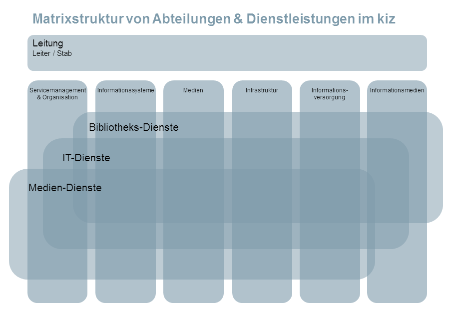 Matrix - Abteilungen und Dienstleistungen des Kommunikations- und Informationszentrums (kiz) der Universität Ulm